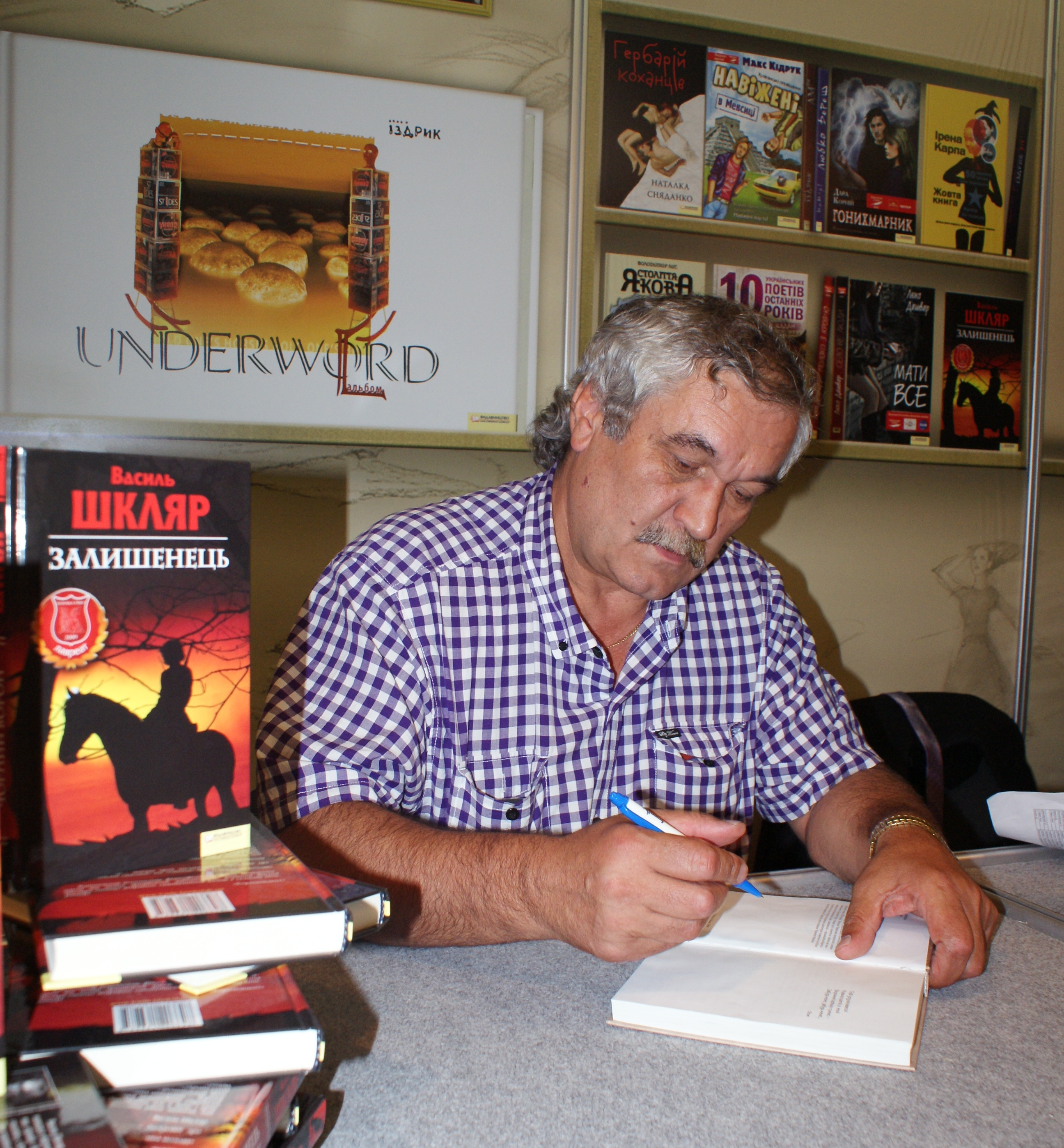 Автограф-сесія Василя Шкляра під час 18-го Форуму видавців у Львові